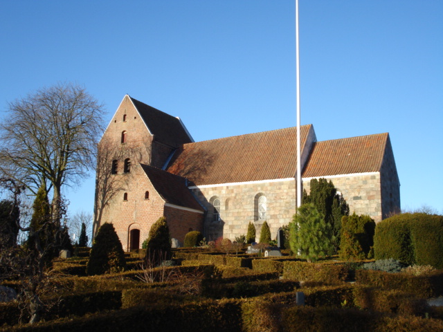 Mørke Kirke / Moerke Church, Jutland, Denmark